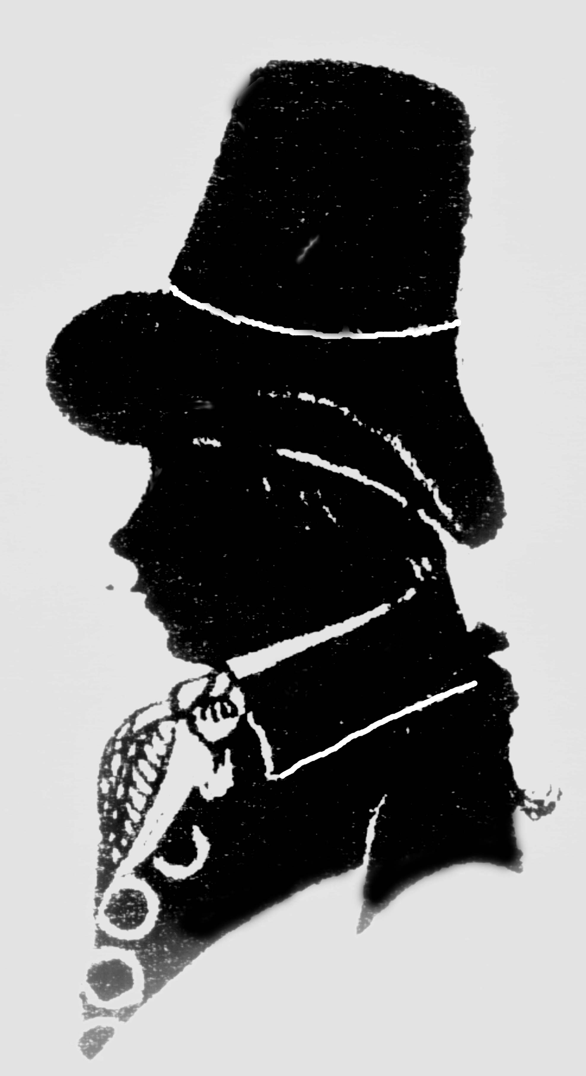 Zollpächter Peter Schmidt (1768-1817) war Tuchfabrikant zu Wermelskirchen